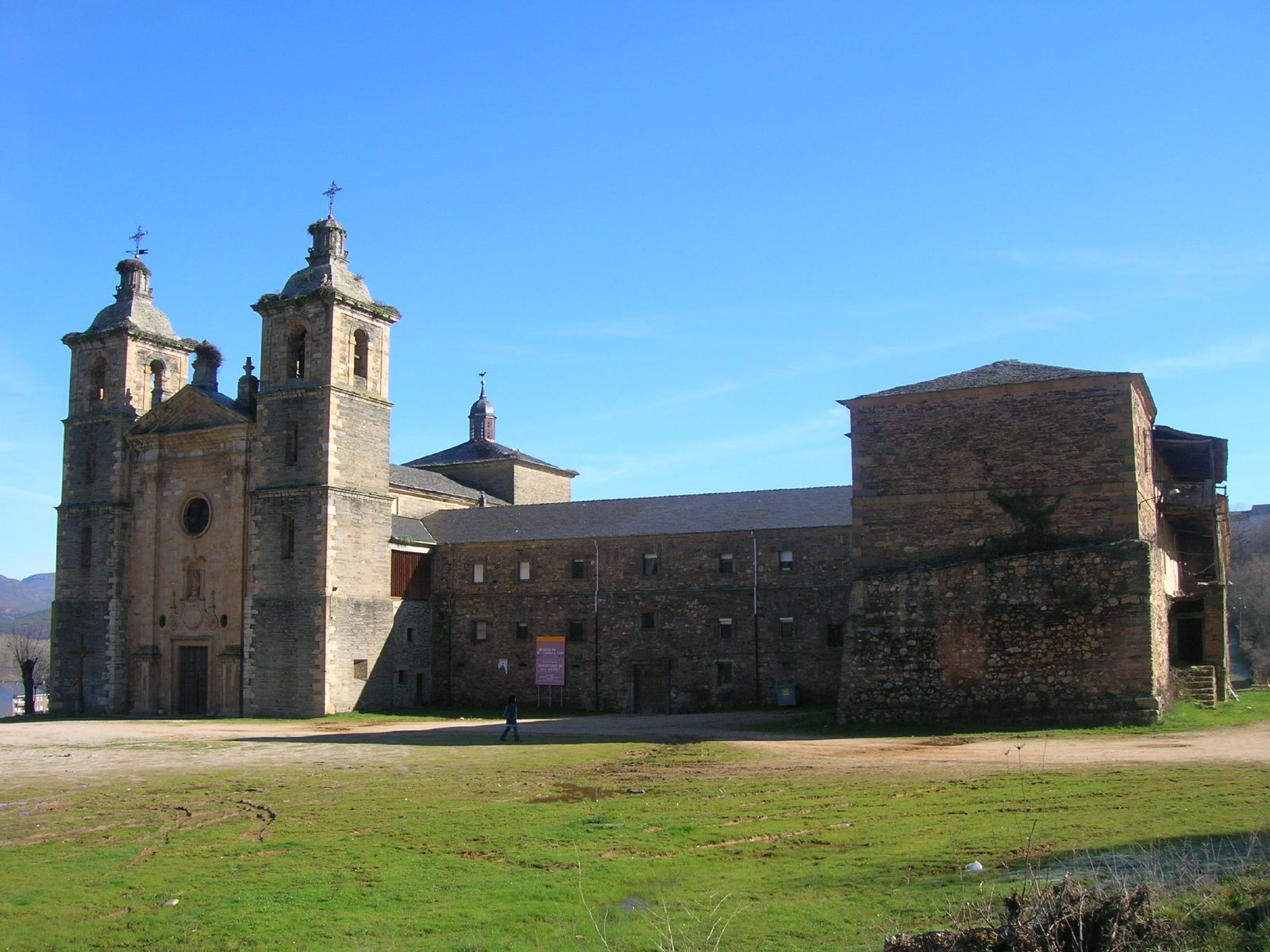 El monasterio de San Andrés de Espinareda, nombre con el que es conocido históricamente, está situado en el Bierzo, provincia de León, en el curso medio del río Cúa. Vuela hasta esta localización. Necesitas el programa Google Earth.